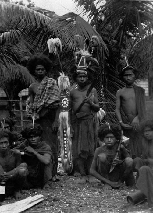 Foto. Portret van een groep mannen van Poelau Solor in krijgskleding